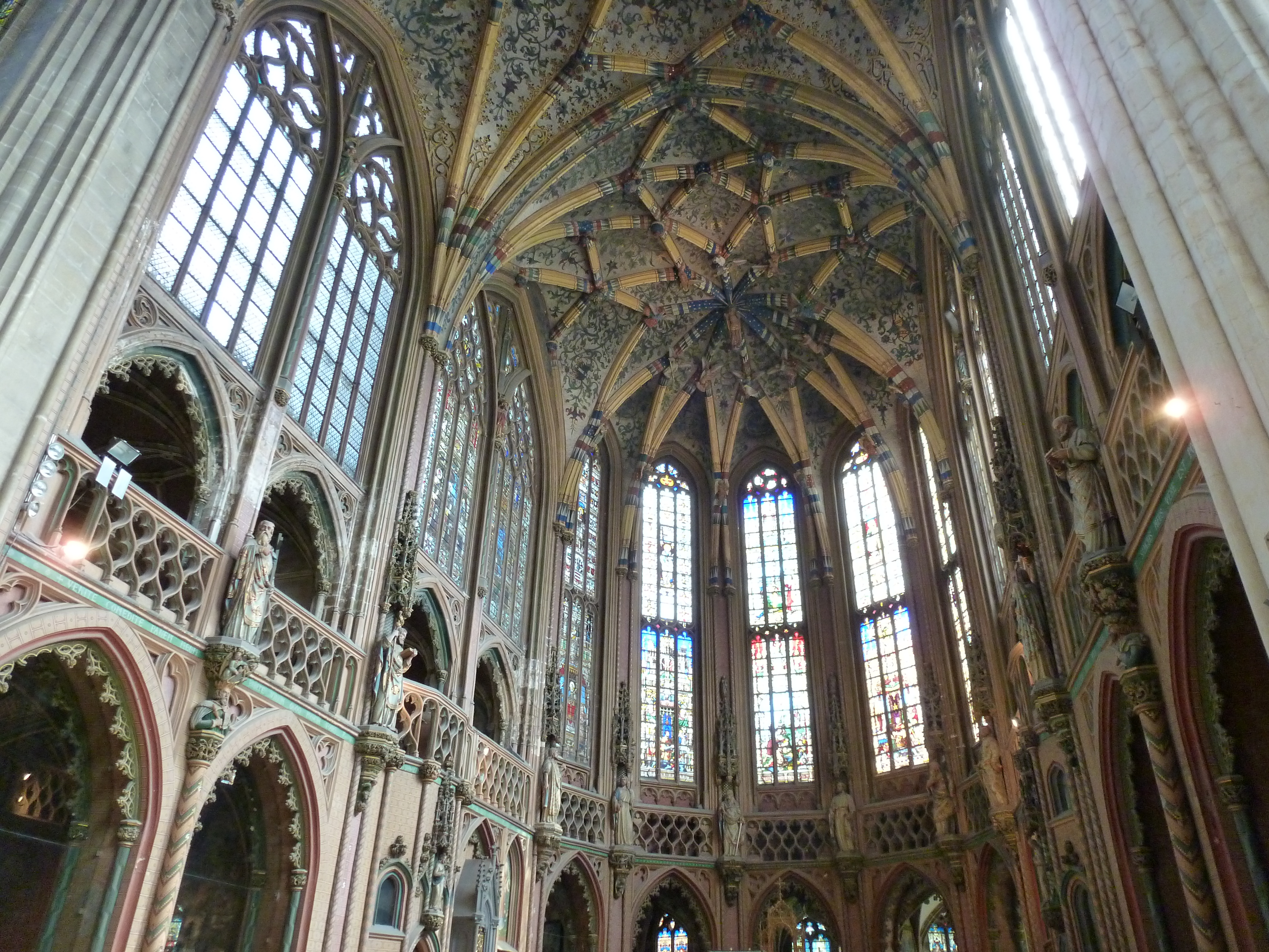 choeur